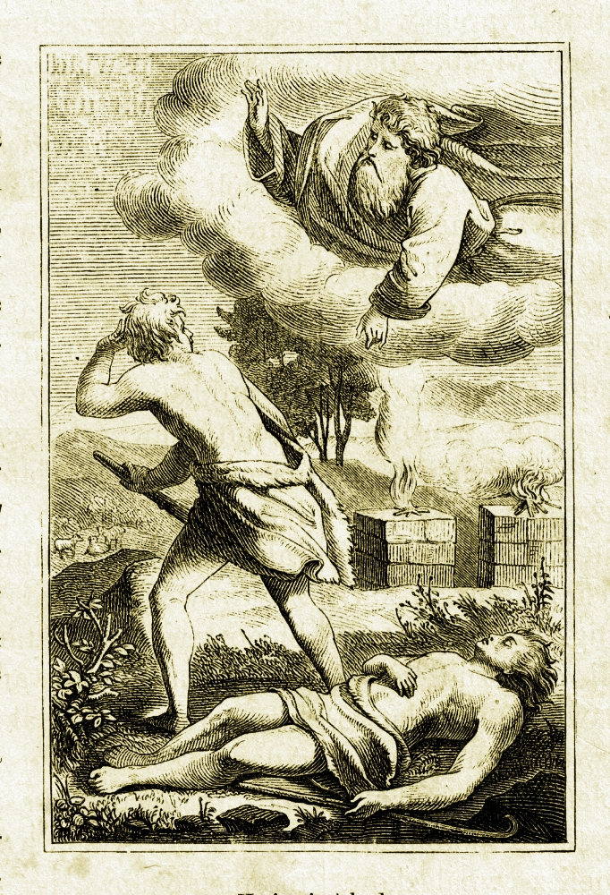 Kain i Abel. Rycinia ze schrobenhausenowskiego warsztatu Carla Poellath